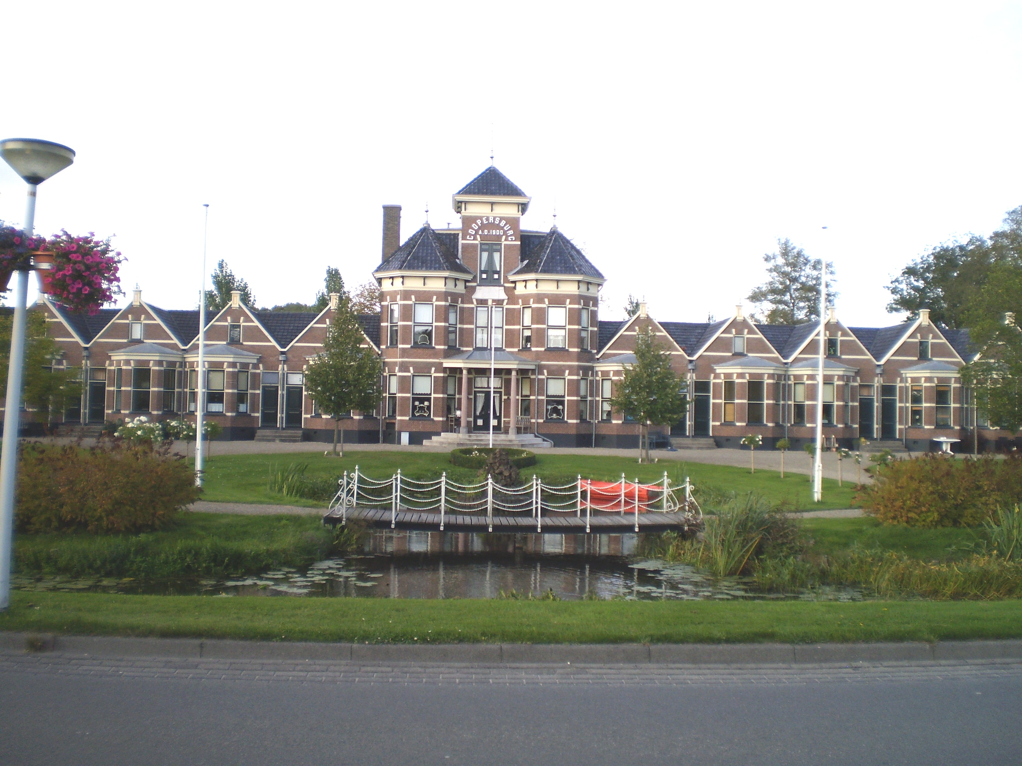 Coopersburg, Akkum.